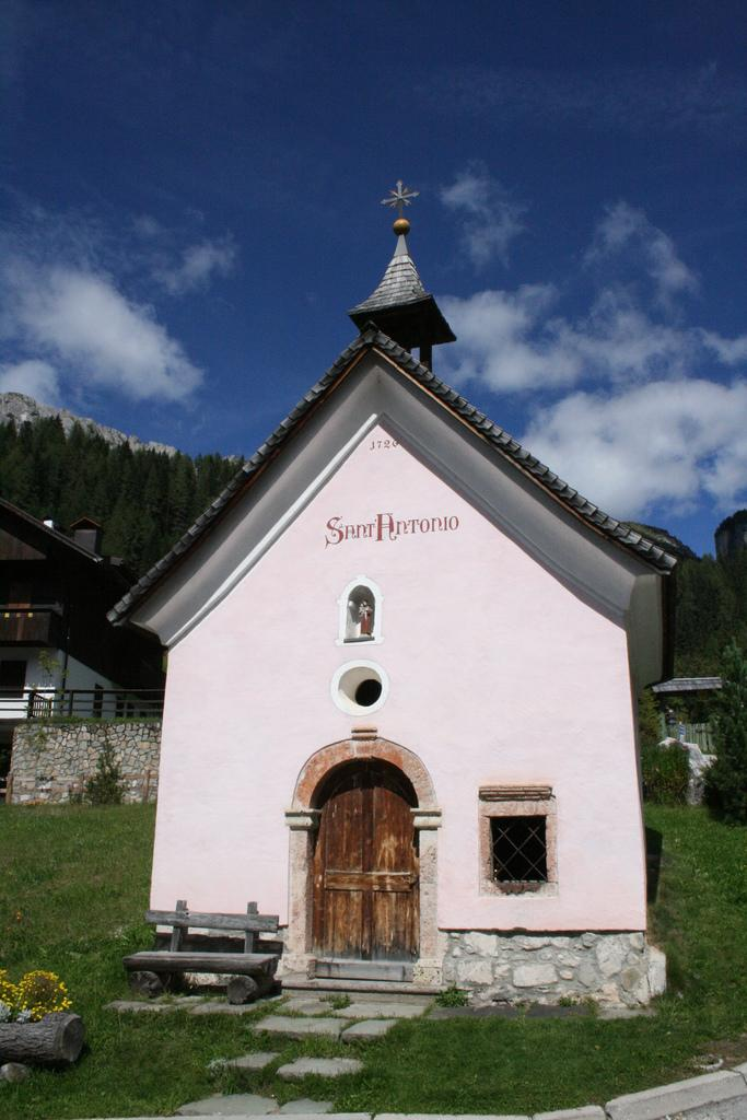 Cappella di Sant'Antonio, Sappada, Veneto, Italia